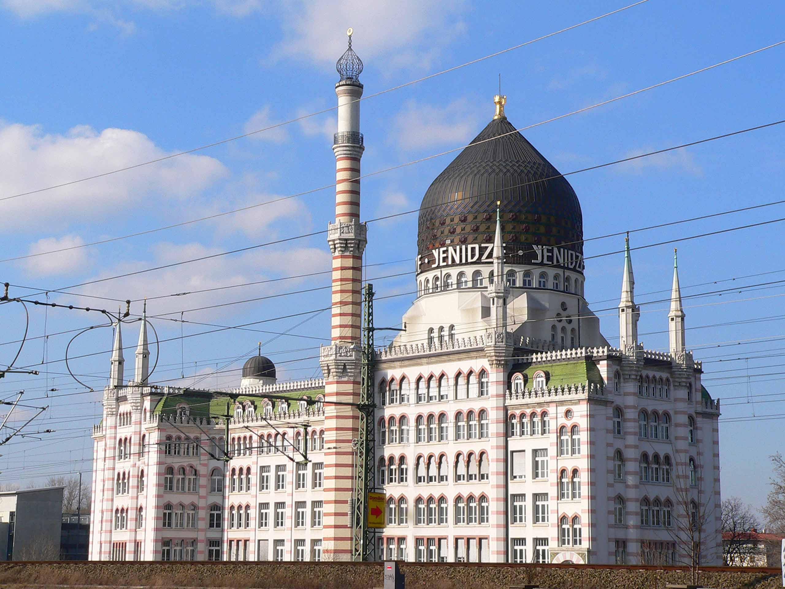 Dresden Yenidze02